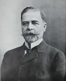 Leopold Filip Kolowrat-Krakowsky (1852 - 1910), Rakouský a český šlechtic a politik.